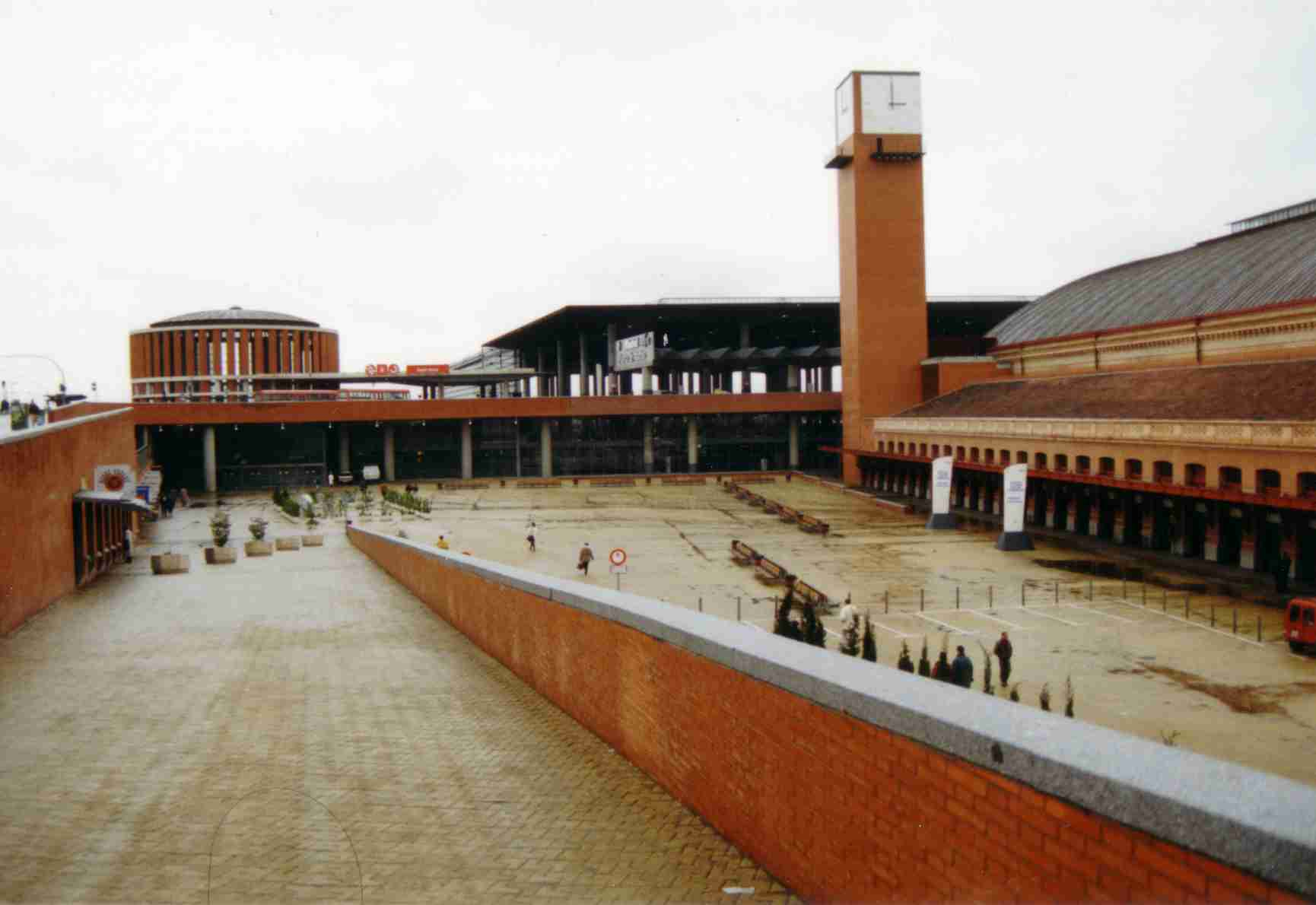 Spanien, Madrid, Bahnhof Atocha, Außenansicht, alter und neuer Teil